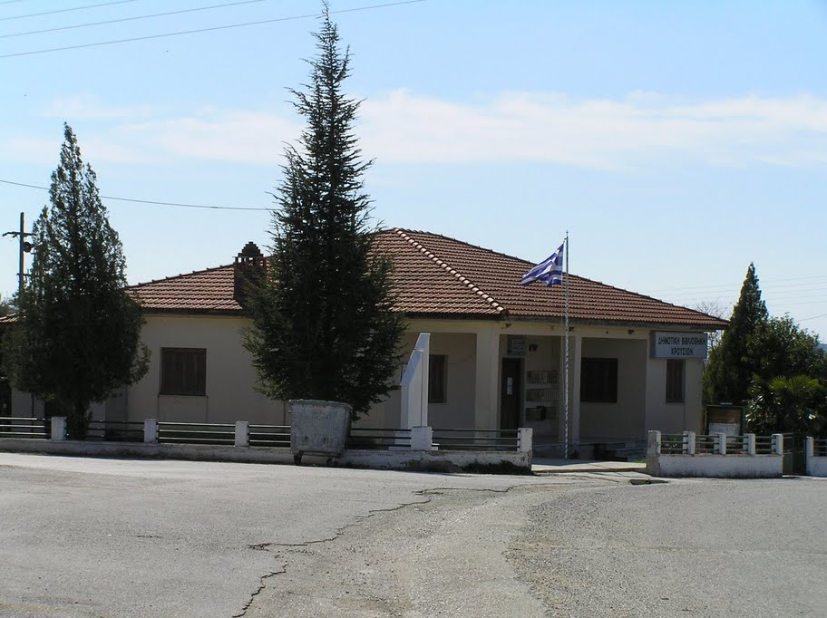 Η Δημοτική βιβλιοθήκη στο Γερακάριο Κιλκίς